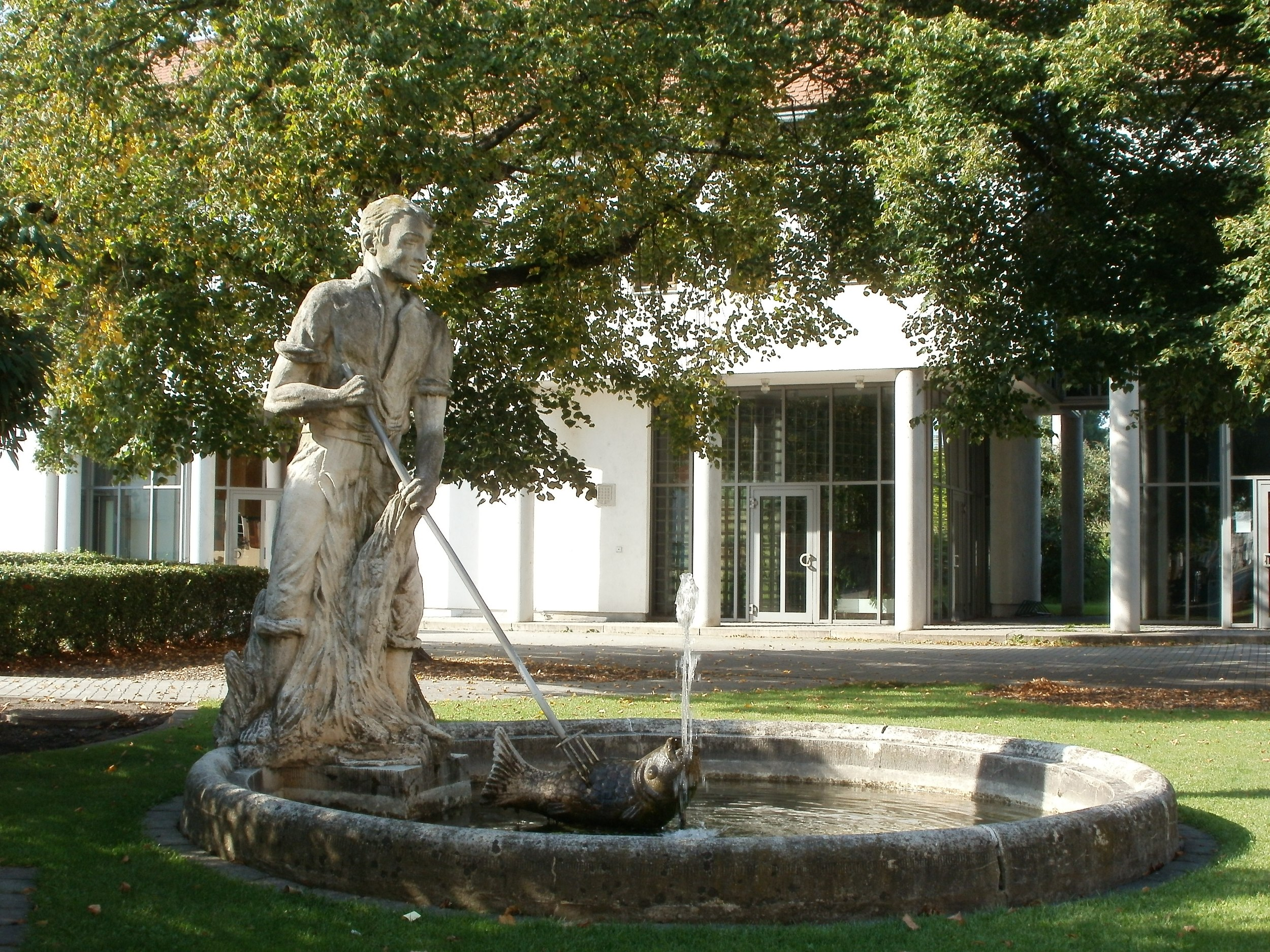 Gemeindehaus St. Laurentius (Oberhausen-Rheinhausen)